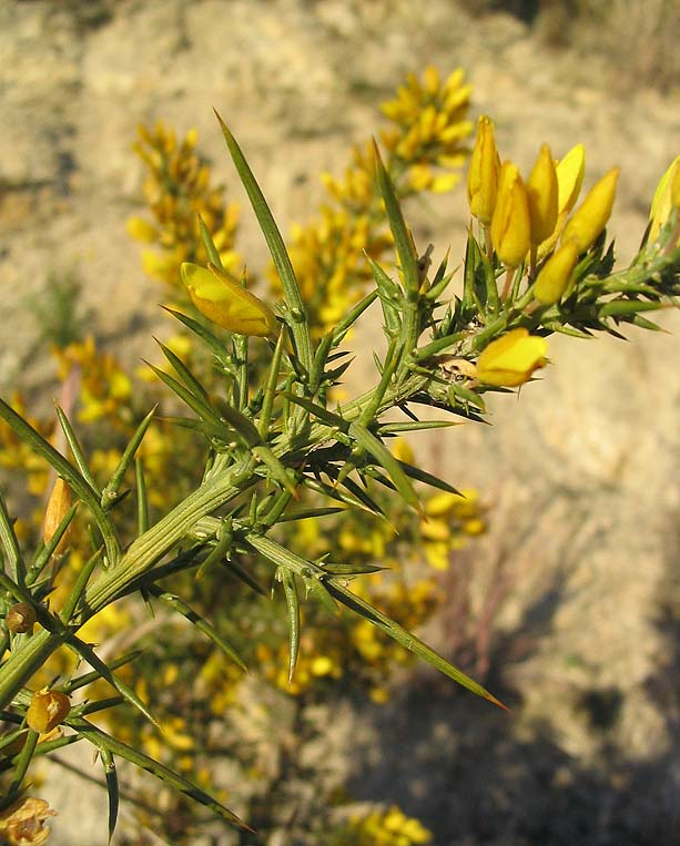 Ulex parviflorus (ajonc de Provence) Photo prise à Ille-sur-Têt en janvier 2005 Jean Tosti 2005